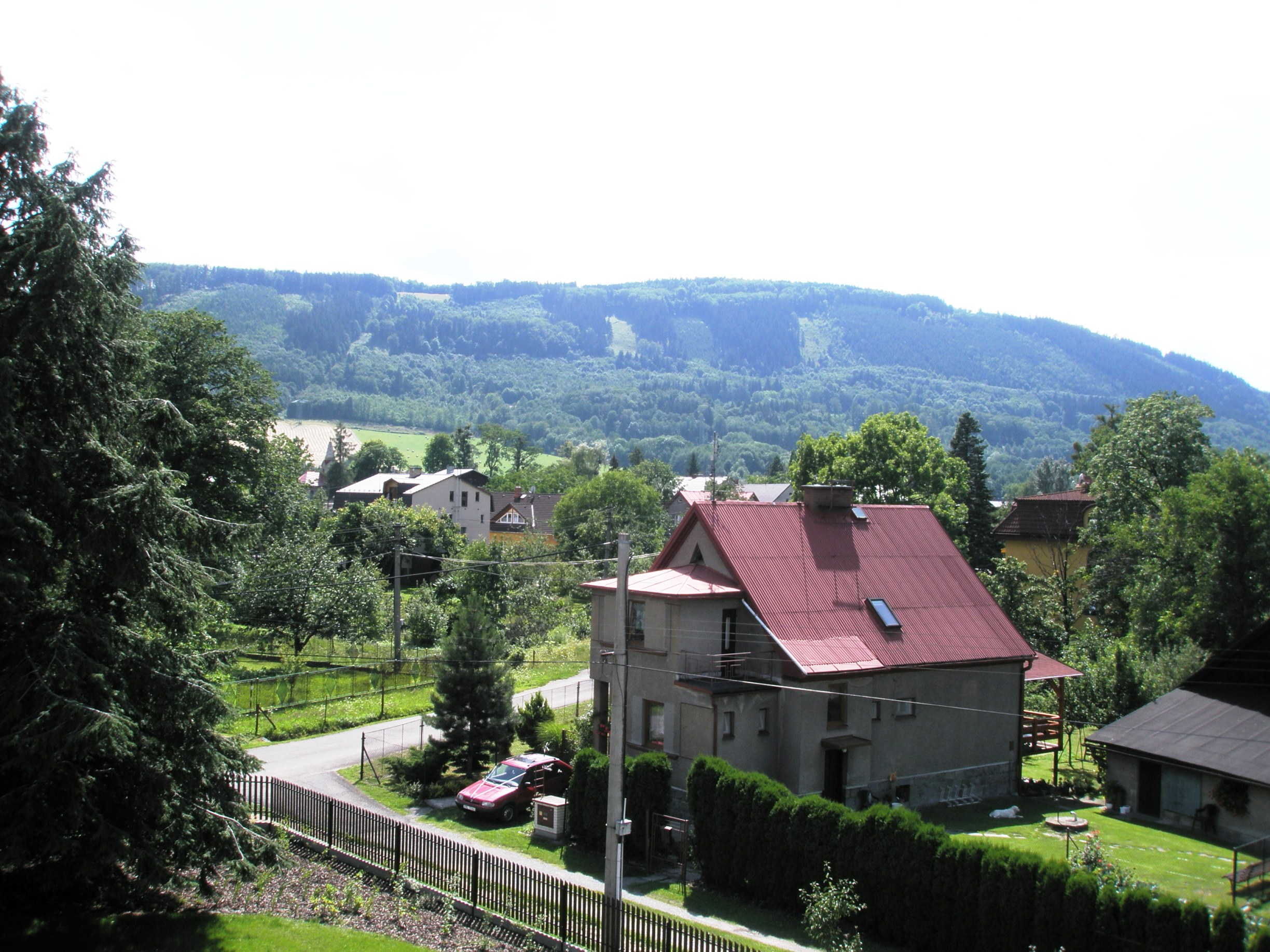 Smilovice, Frýdek-Místek District, Czech Republic